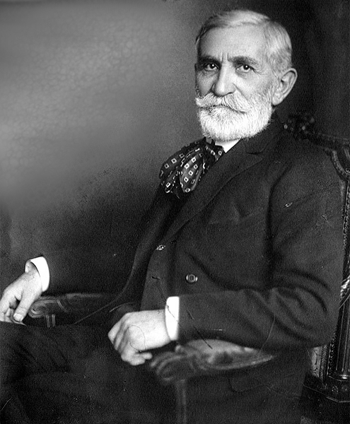 Benedek Elek (Kisbacon, 1859. szeptember 30. – Kisbacon, 1929. augusztus 17.) magyar újságíró, író, országgyűlési képviselő, „a nagy mesemondó”.